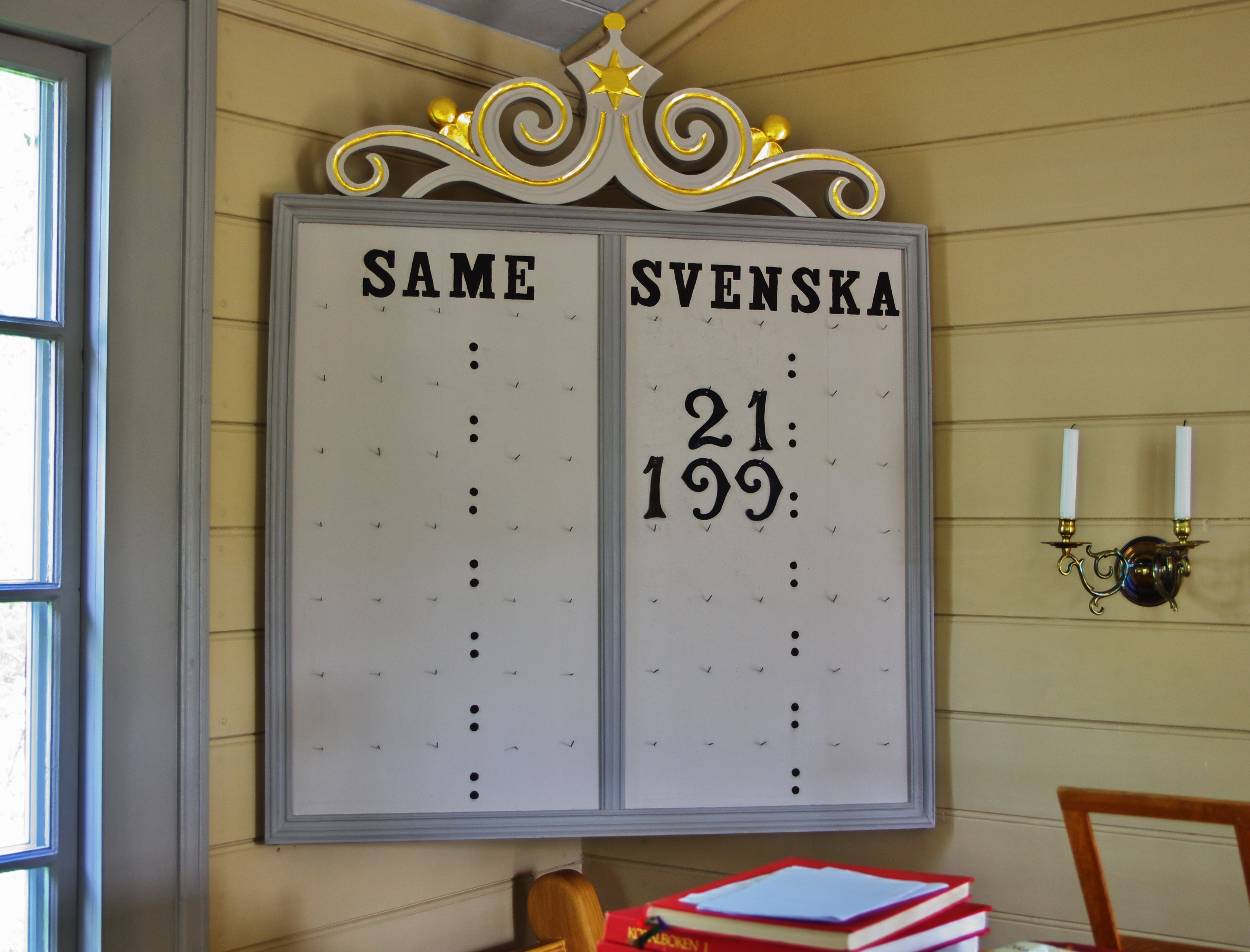 Jäkkviks kapell i Jäkkvik i Arjeplogs kommun i Lappland i Sverige. Kapellet uppfördes år 1777 på Lövmokk, en landtunga söder om kapellforsen. Kapellet flyttades till sin nuvarande plats i Jäkkvik år 1885.